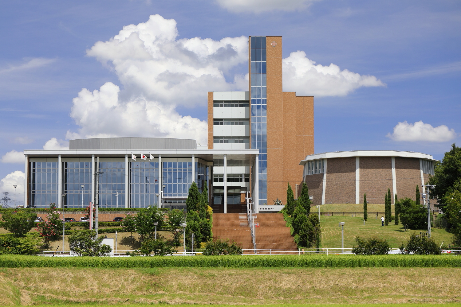 日本赤十字豊田看護大学遠景（豊田市白山町、2019年（令和元年）8月）